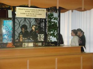 Отдел информации, регистрации и учета Костанайской ОУНБ им.Л.Н. Толстого